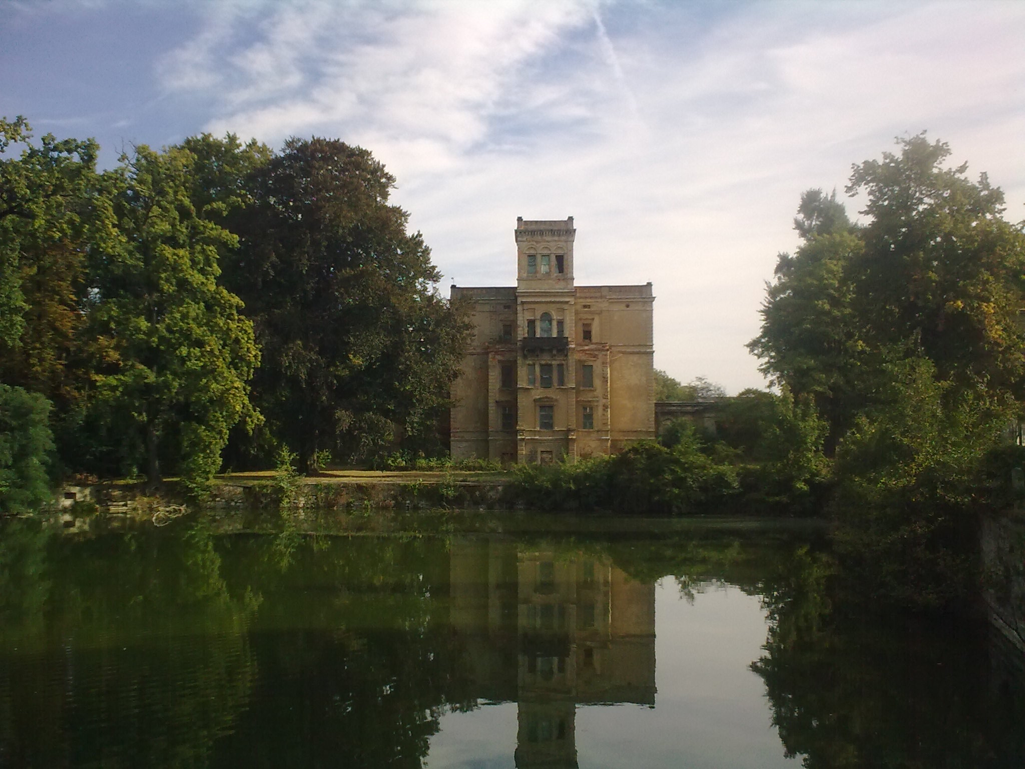 Mrowiny, ul. Zamkowa - pałac, XVII, 1870